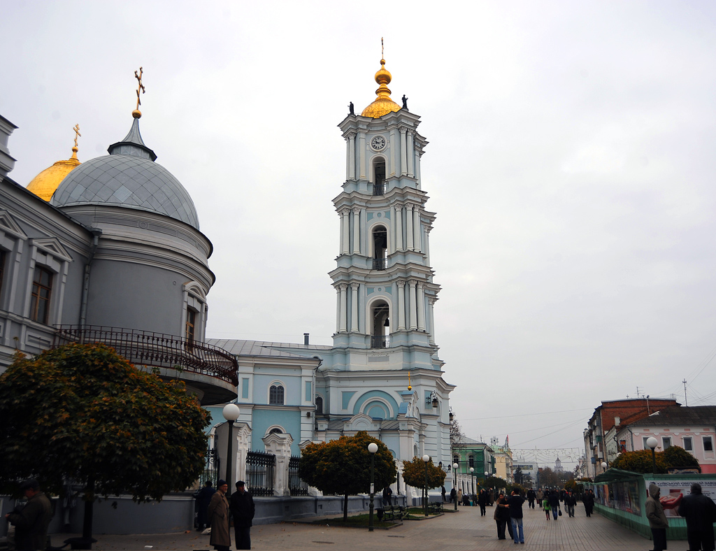 Кафедральный Спасо-Преображенский Собор